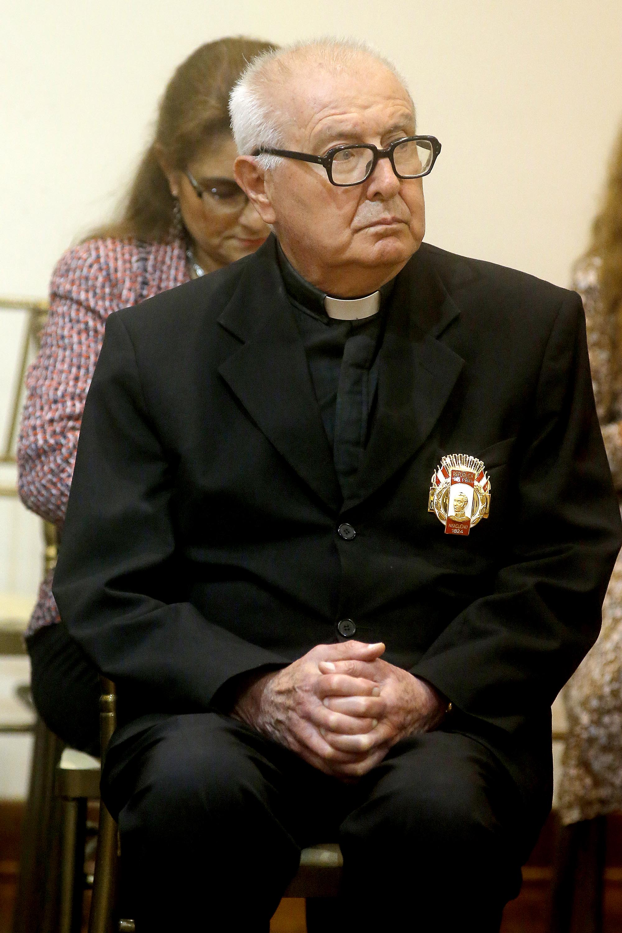 El ministro de Defensa Pedro Cateriano distinguió con la “Orden Militar de Ayacucho” a destacados intelectuales y funcionarios de la Cancillería, por los importantes servicios prestados a la Nación. El ministro Cateriano entregó la “Orden Militar de Ayacucho” a los reconocidos historiadores José Agustín de la Puente Candamo en el grado de Gran Cruz, y al reverendo padre Armando Nieto Vélez S.J. en el grado de Gran Oficial, en mérito a su importante contribución como historiadores y catedráticos universitarios. La ministra en el servicio diplomático Marisol Agüero y el abogado Juan José Ruda recibieron la distinción en el grado de Comendador. La primera fue coordinadora del equipo que participó ante la Corte Internacional de Justicia de La Haya, en el caso con Chile, y el segundo participó como asesor jurídico de la Cancillería en ese proceso.